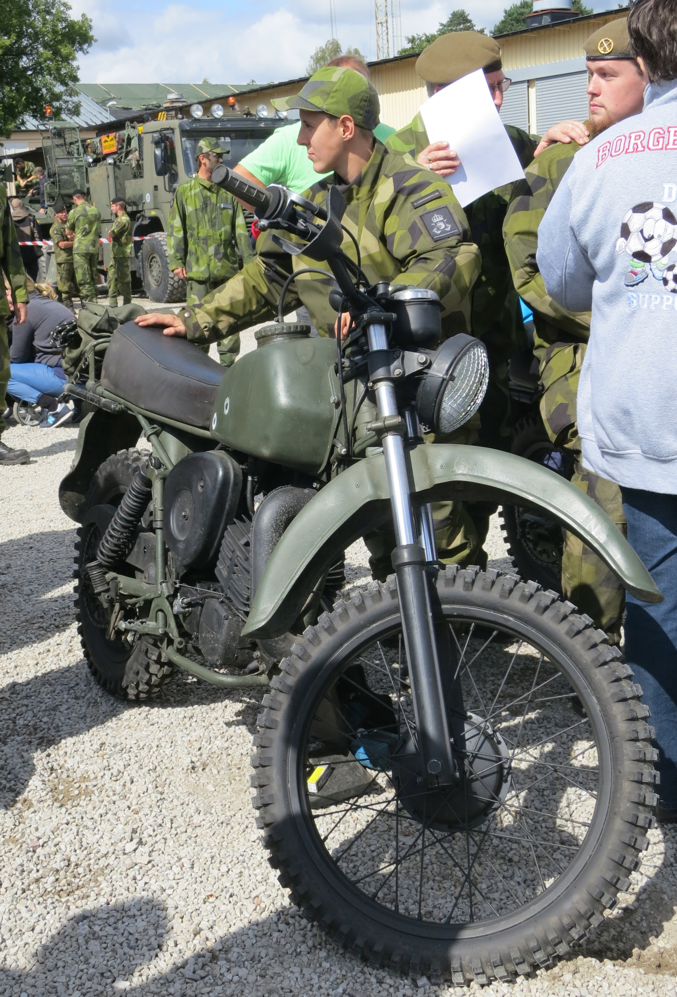 Svenska arméns motorcykel 258